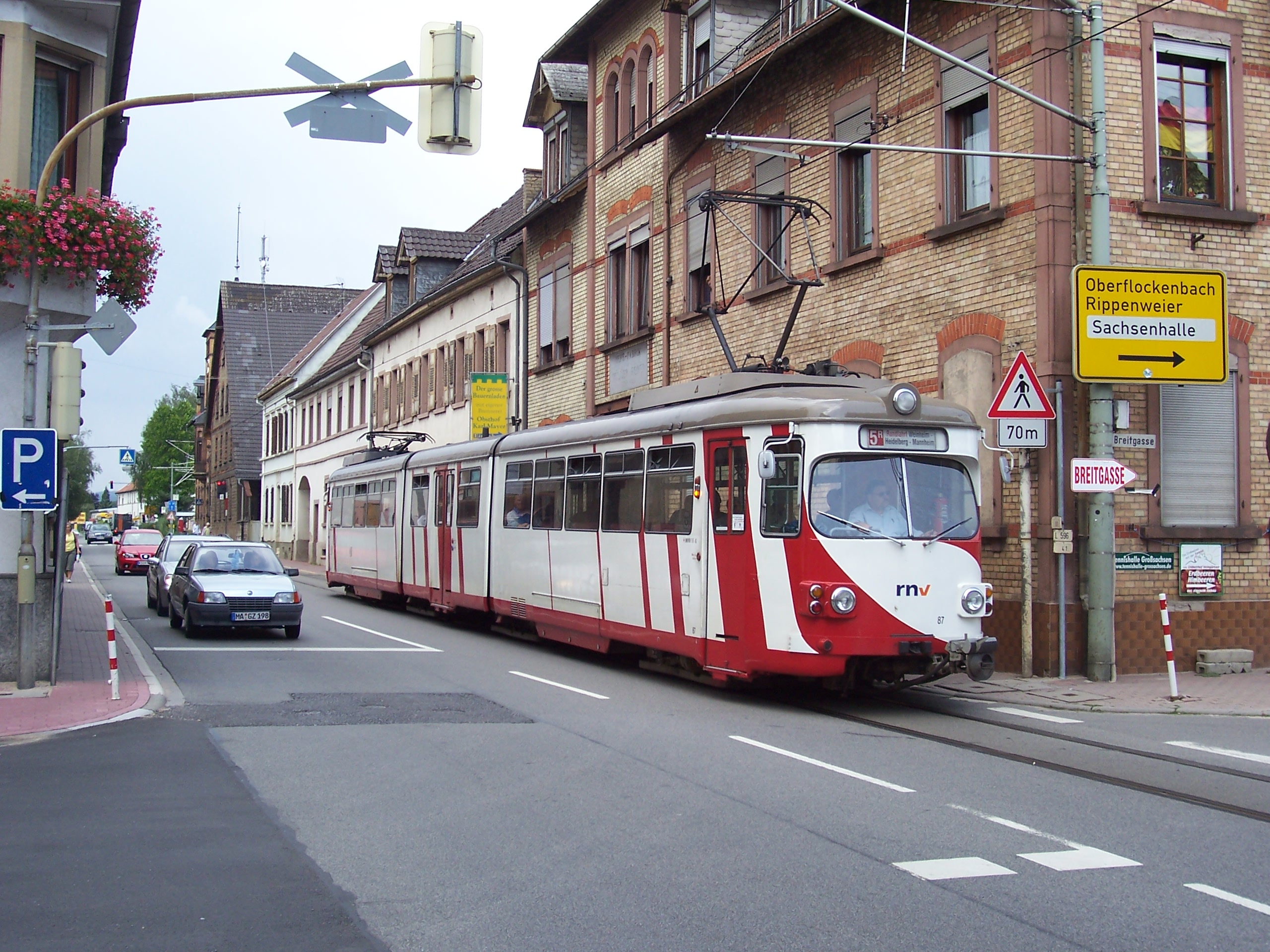 Der 8-achsige DÜWAG-Gelenktriebwagen Nummer 87 der OEG bei der eingleisigen Orstsdurchfahrt in Straßenlage durch Großsachsen an der Bergstraße.